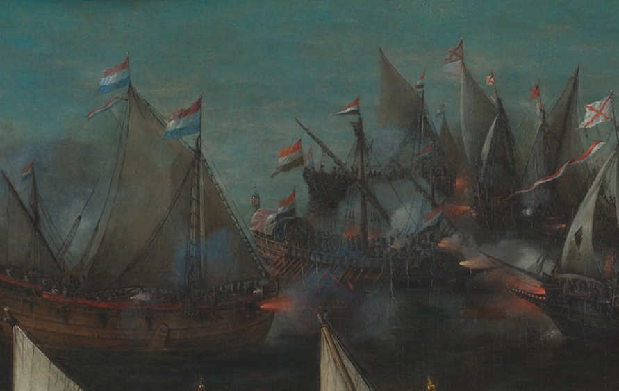 Close-up van de zeeslag tussen Hollandse en Spaanse schepen en galeien op het Haarlemmermeer op 26 mei 1573 in een mislukte poging tot ontzet van Haarlem.Hendrik Cornelisz Vroom (ca. 1566–1640), olieverf op doek, in of na 1629